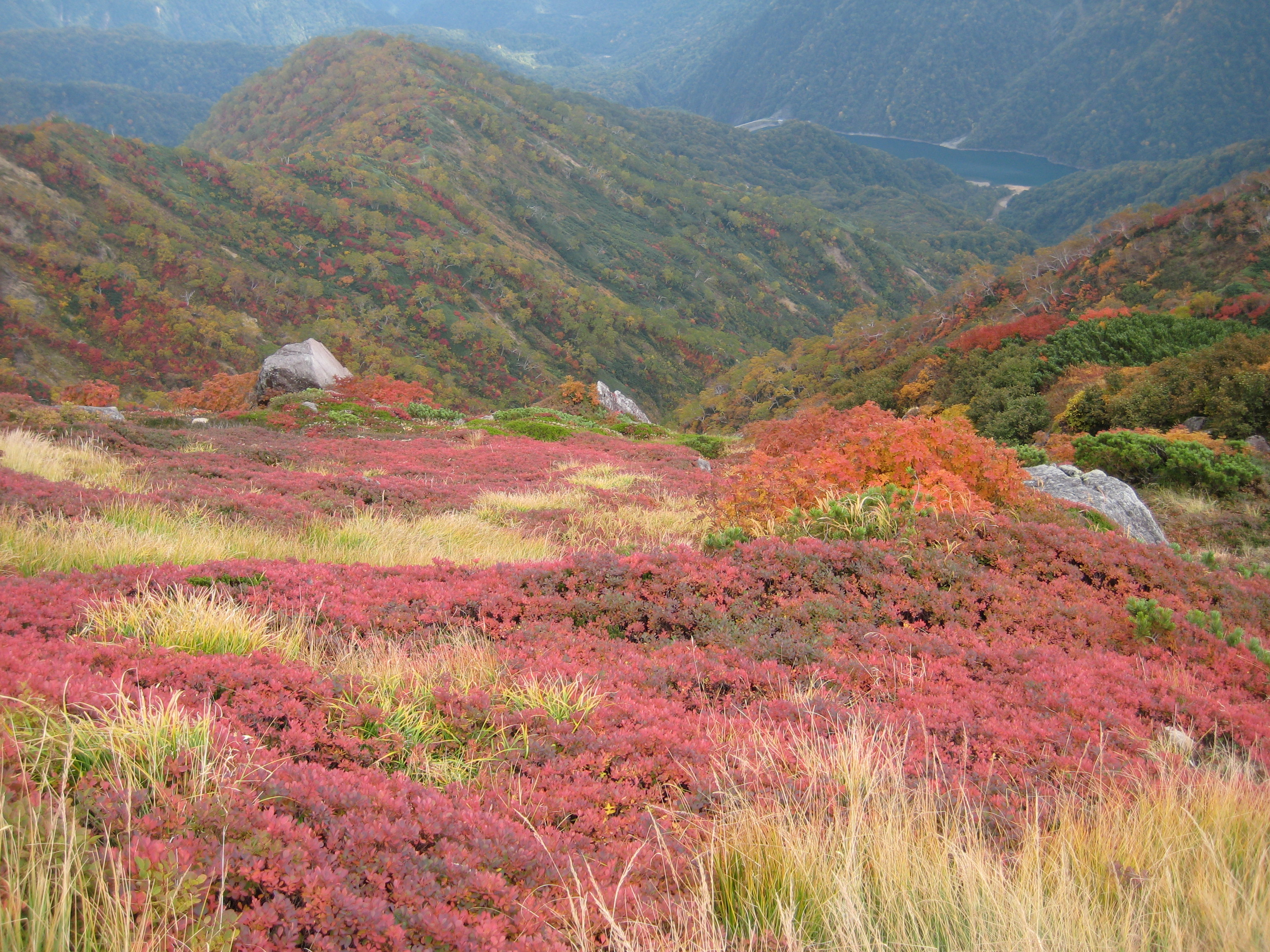 紅葉. 苗場山頂付近の紅葉, 苗場山